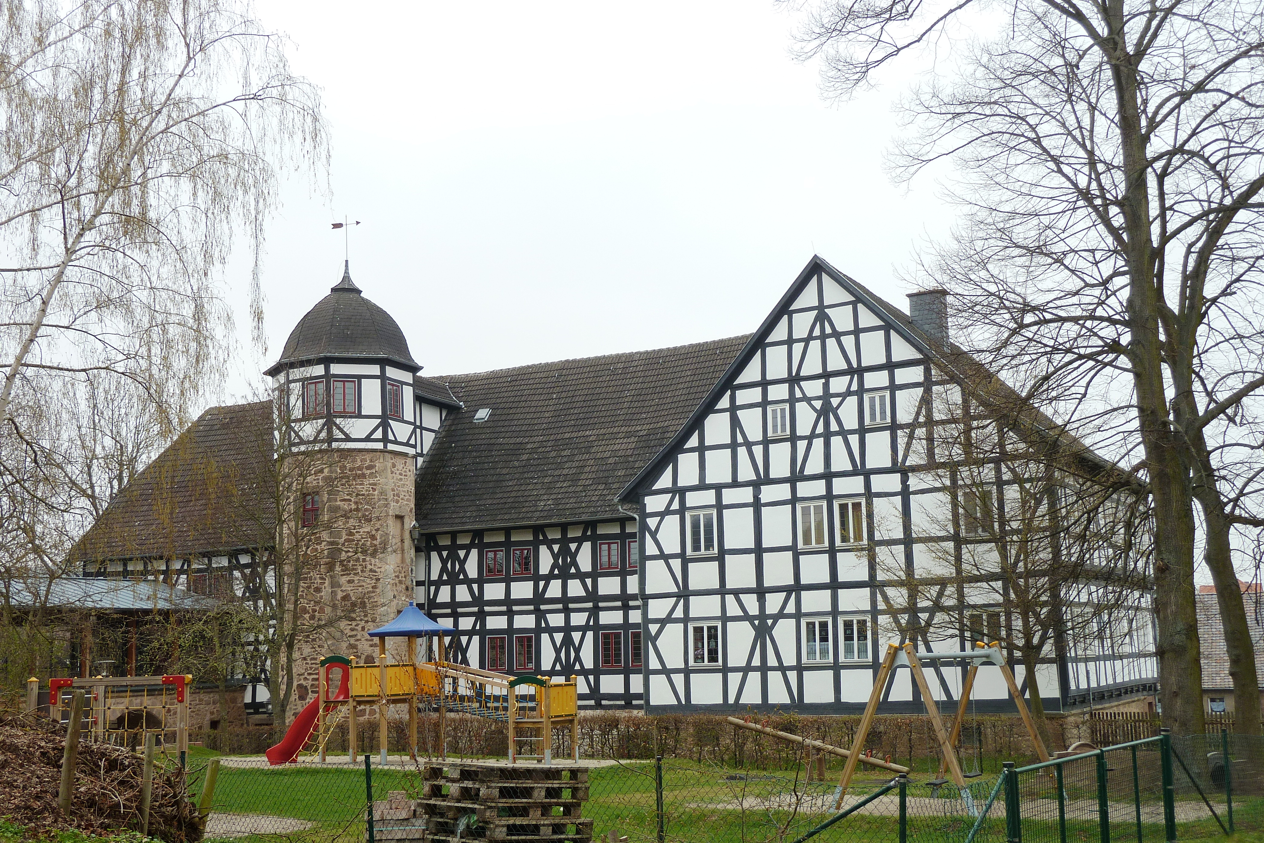 Rückseite von Schloss Ermschwerd in Ermschwerd, Stadt Witzenhausen, Nordhessen